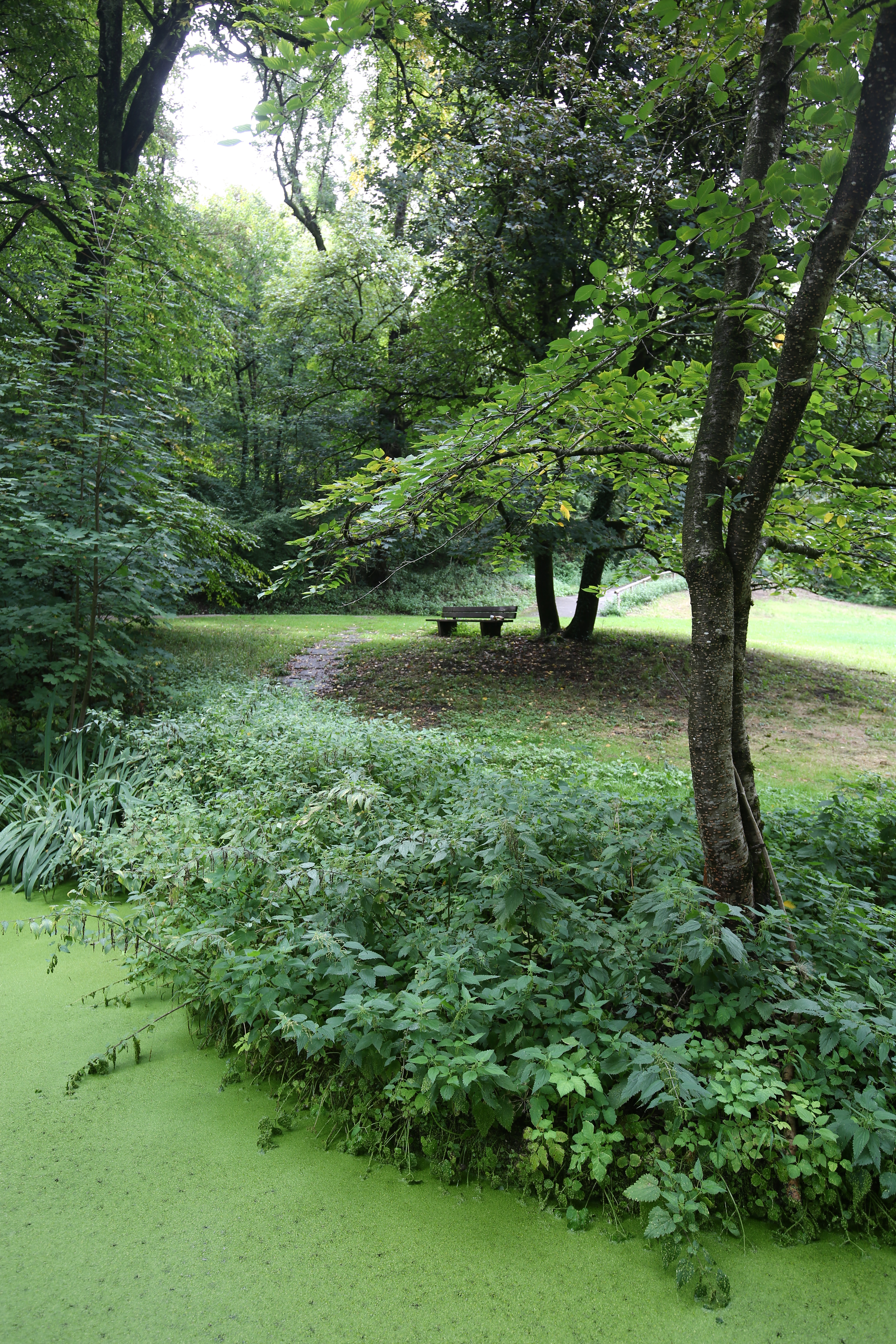 Der Gierlinger Park ist eine städtische Grünanlage im Münchner Stadtteil Thalkirchen. Er entstand Ende des 19. Jahrhunderts als private Vergnügungsstätte und wurde 1965 zum öffentlichen Park.